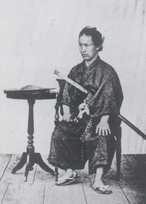 近藤長次郎。Kondou Tyojiro.